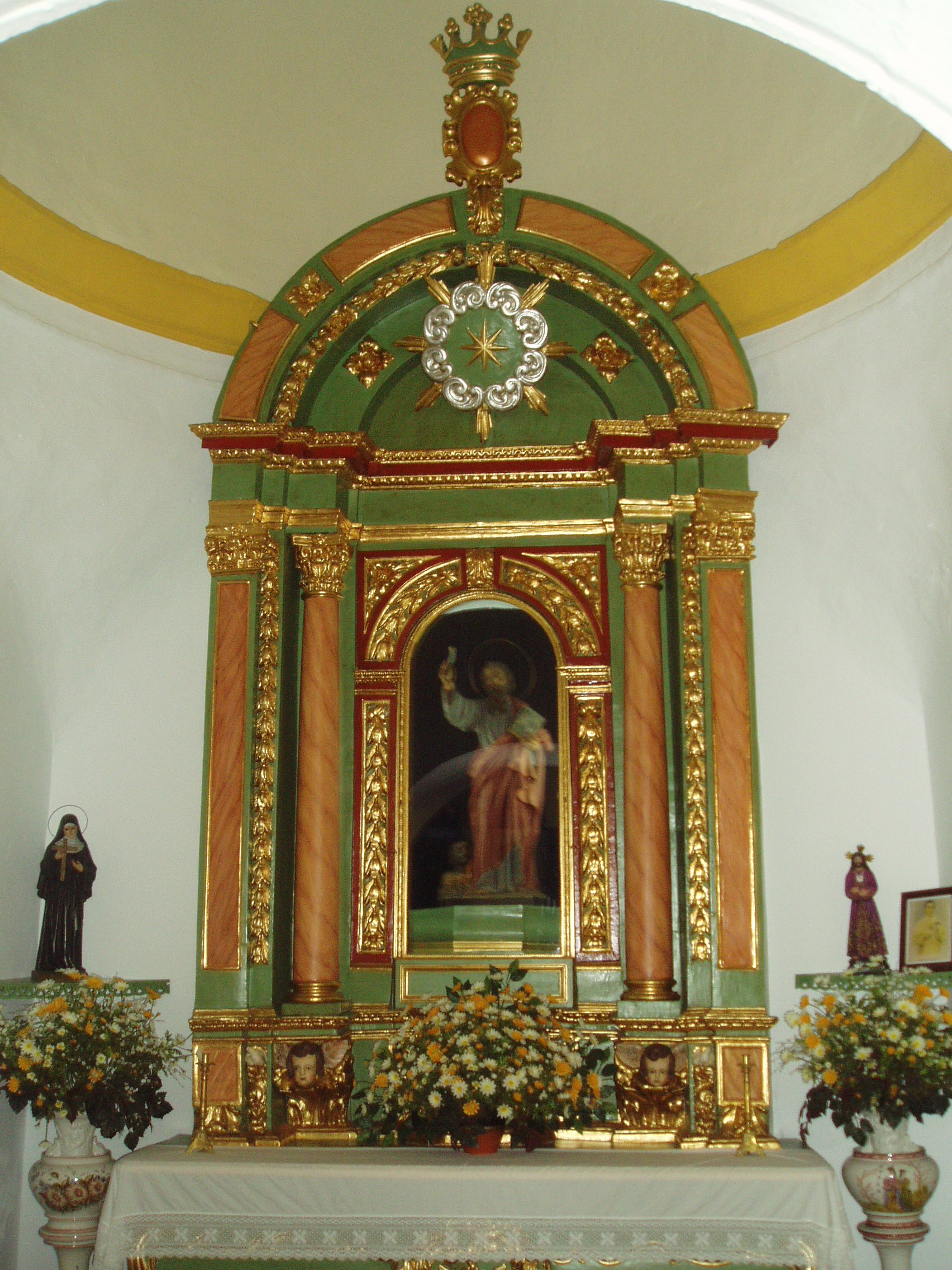 Actual retablo de San Bartolomé tras las obras de reforma de 2008.